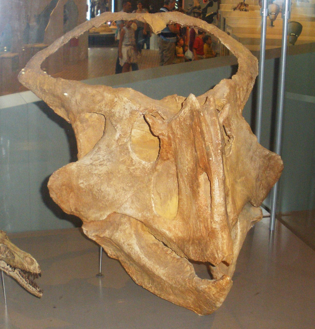 Fossil of Protoceratops, a ceratopsian dinosaur Took the photo at Musee d'Histoire Naturelle, Brussels